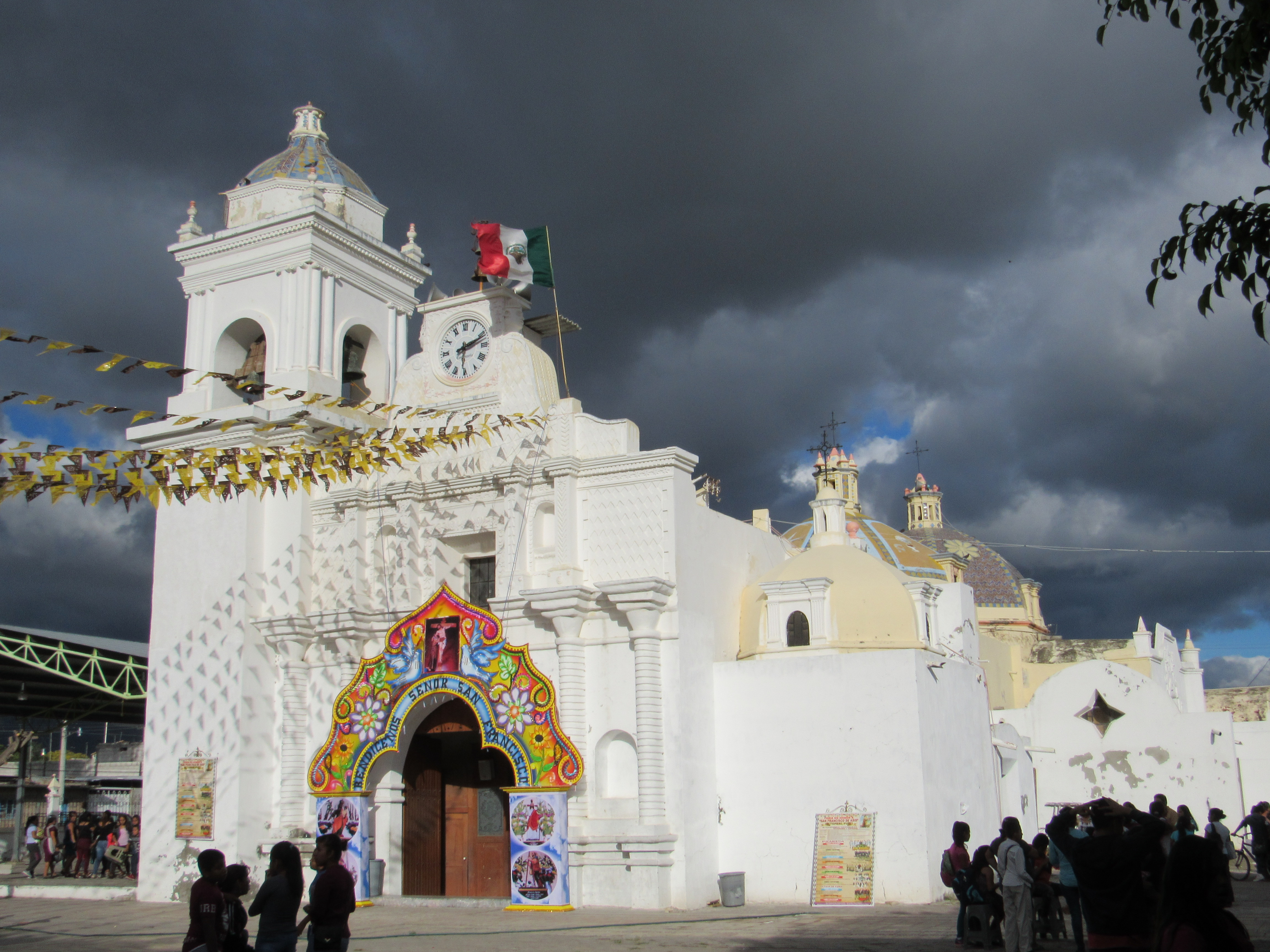 Ubicado en San Francisco Altepexi, lleva el nombre del Santo Patrono, la parroquia data de 1831 y su fiesta patronal es el 4 de octubre, todas las localidades de la regional baja a la celebración (Valle, Mixteca y Sierra Negra).